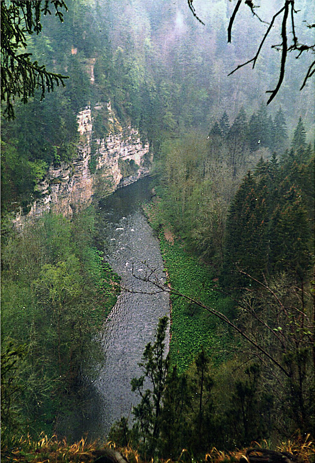 Wutach gorge, Black Forest, view from 'Kanzelfels'